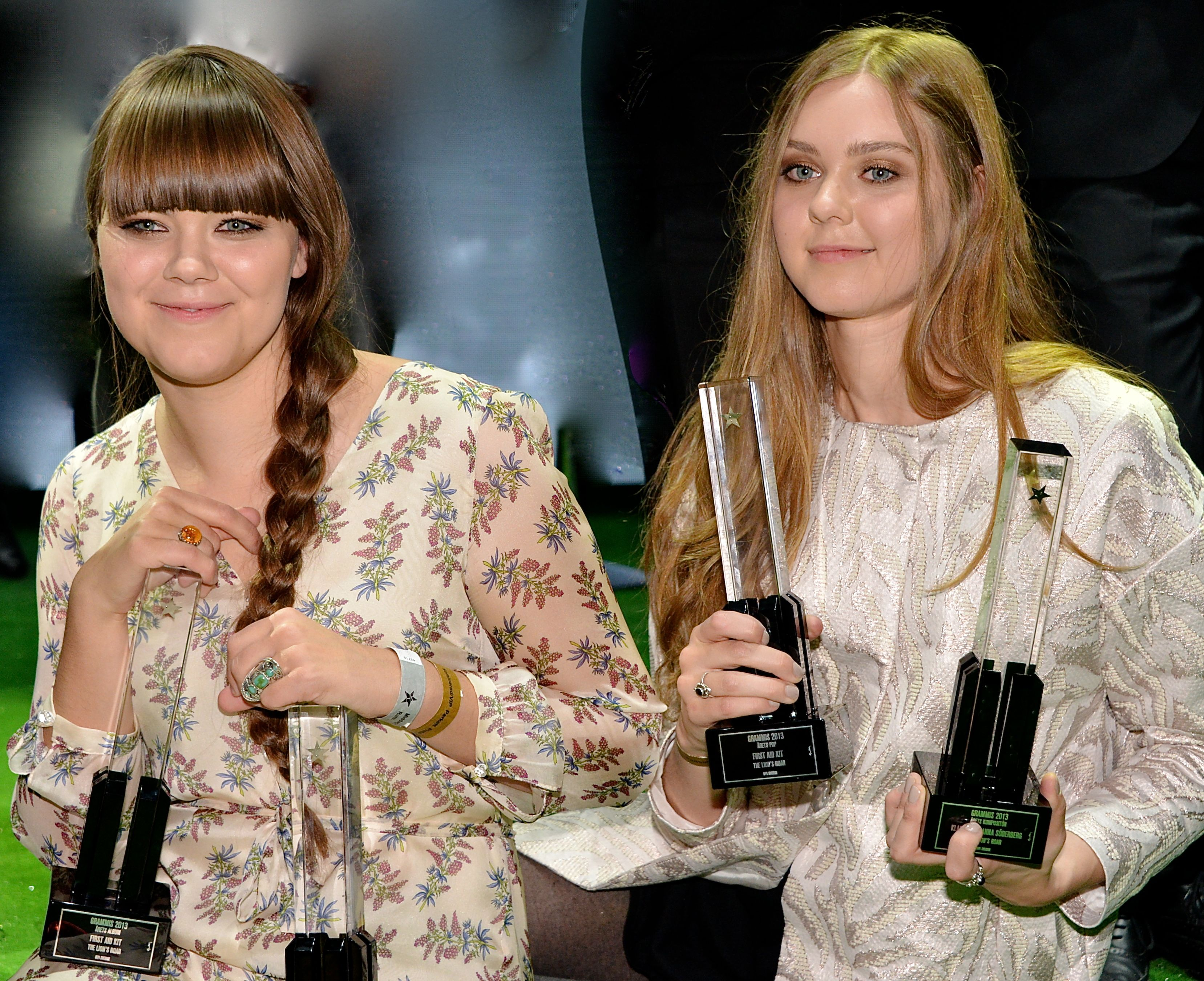 Firs Aid Kit på Grammisgalan på Cirkus, Stockholm den 20 februari 2013.